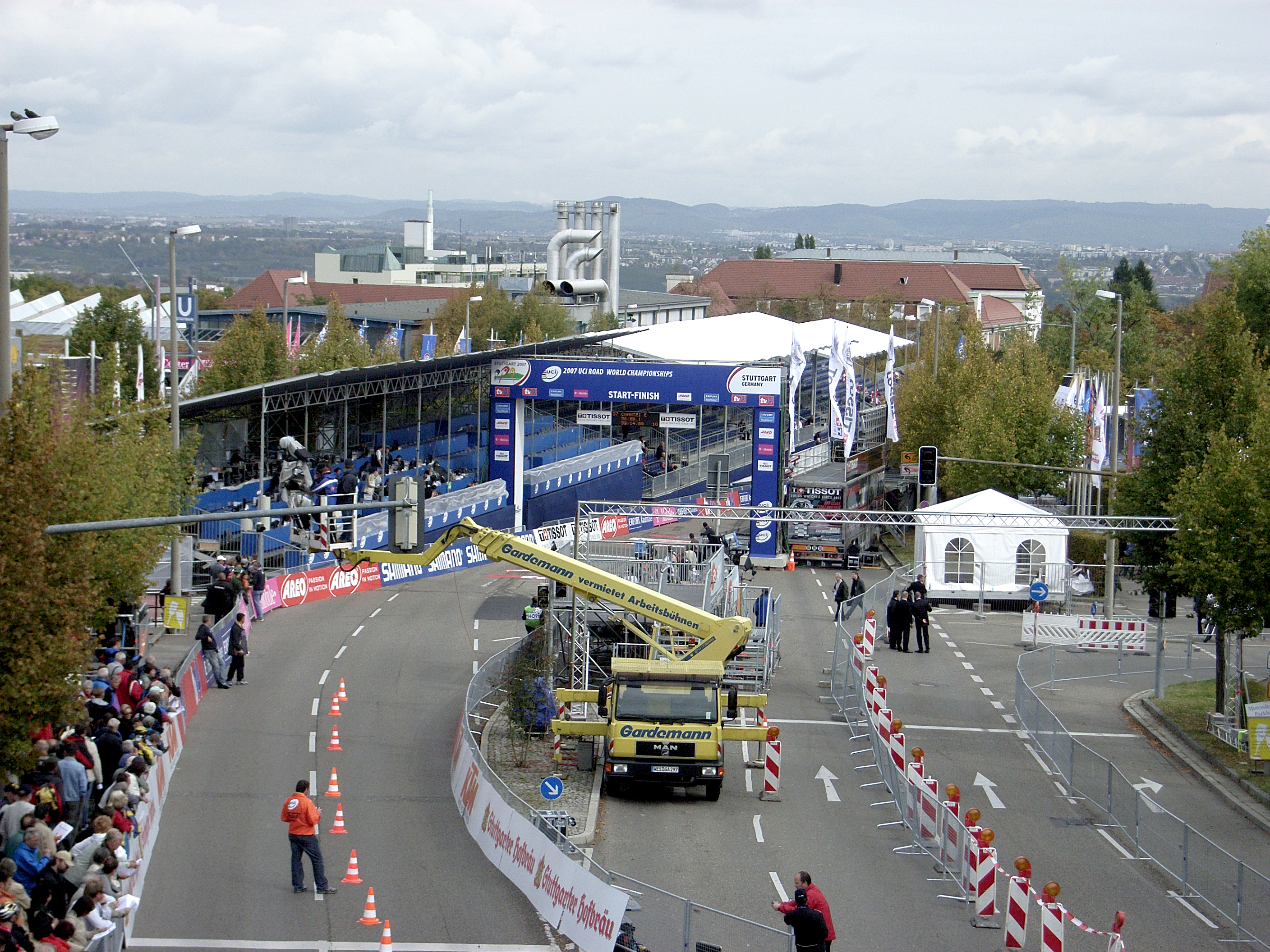 Dieses Bild zeigt die Start- und Ziellinie während des Einzelzeitfahren der Frauen bei der Straßen-Radweltmeisterschaft 2007 in Stuttgart.